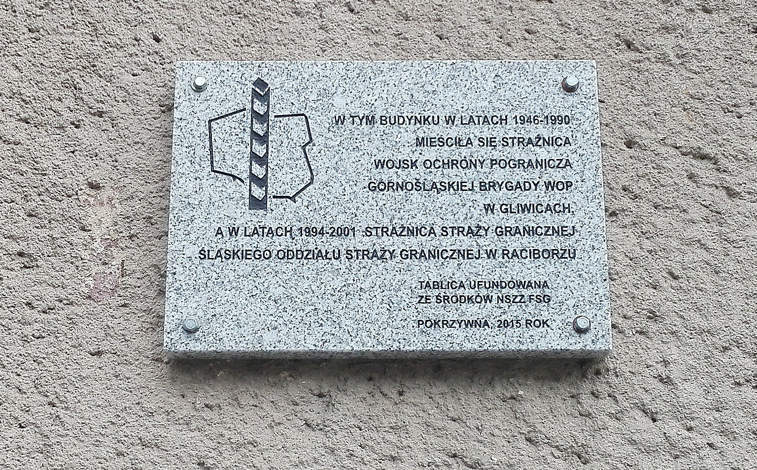 Szkolne Schronisko Młodzieżowe. Tablica pamiątkowa informująca, że stacjonowała w tym obiekcie, latach 1946-1990 Strażnica Wojsk Ochrony Pogranicza, a 1994-2001 Strażnica Straży Granicznej. Tablica została ufundowana ze środków Zarządu Oddziałowego Niezależnego Samorządnego Związku Zawodowego Funkcjonariuszy Straży Granicznej przy Śląsko-Małopolskim Oddziale Straży Granicznej w Raciborzu zgodnie z uchwałą z 24 lutego 2015 roku. Inicjatorami ufundowania upamiętnienia byli funkcjonariusze Placówki SG w Opolu, którzy w przeszłości służyli w Pokrzywnej.